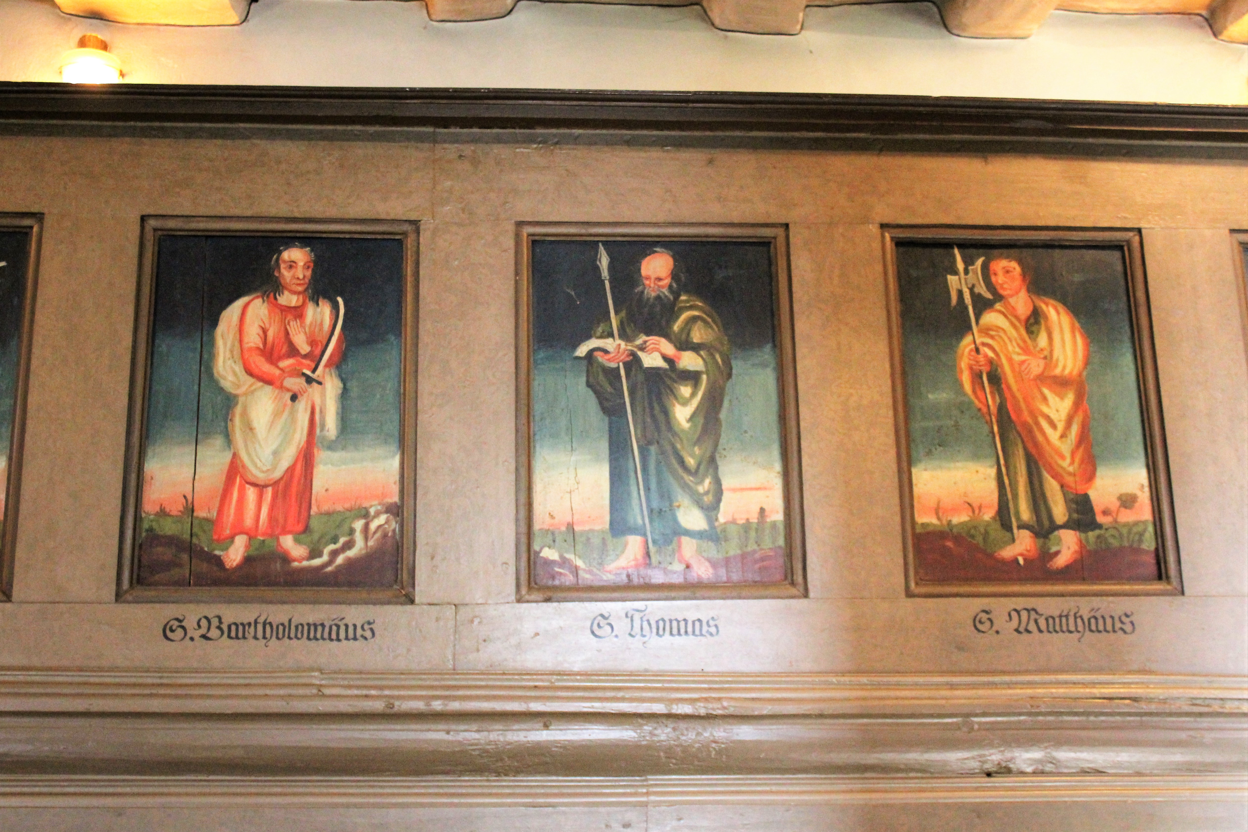 Evanglische Kirche Rodenhausen, Gemeinde Lohra, Landkreis Marburg-Biedenkopf, Hessen, Deutschland